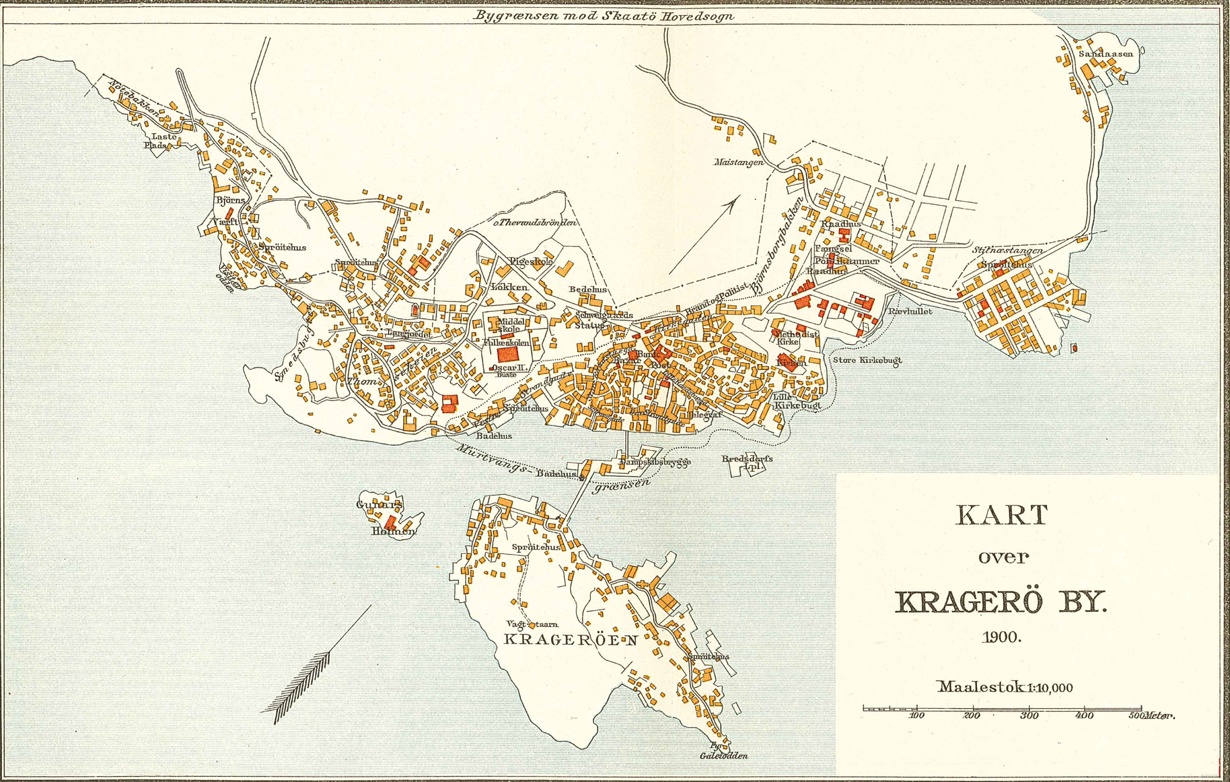 Kart over Kragerø